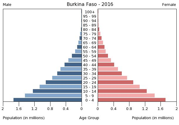 A population pyramid illustrates the age and sex structure of a country's population and may provide insights about political and social stability, as well as economic development. The population is distributed along the horizontal axis, with males shown on the left and females on the right. The male and female populations are broken down into 5-year age groups represented as horizontal bars along the vertical axis, with the youngest age groups at the bottom and the oldest at the top. The shape of the population pyramid gradually evolves over time based on fertility, mortality, and international migration trends.